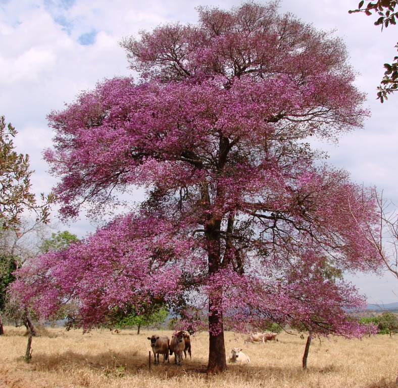 Physocalymma scaberrimum - LYTHRACEAE Pirenópolis, Goiás, Brasil.